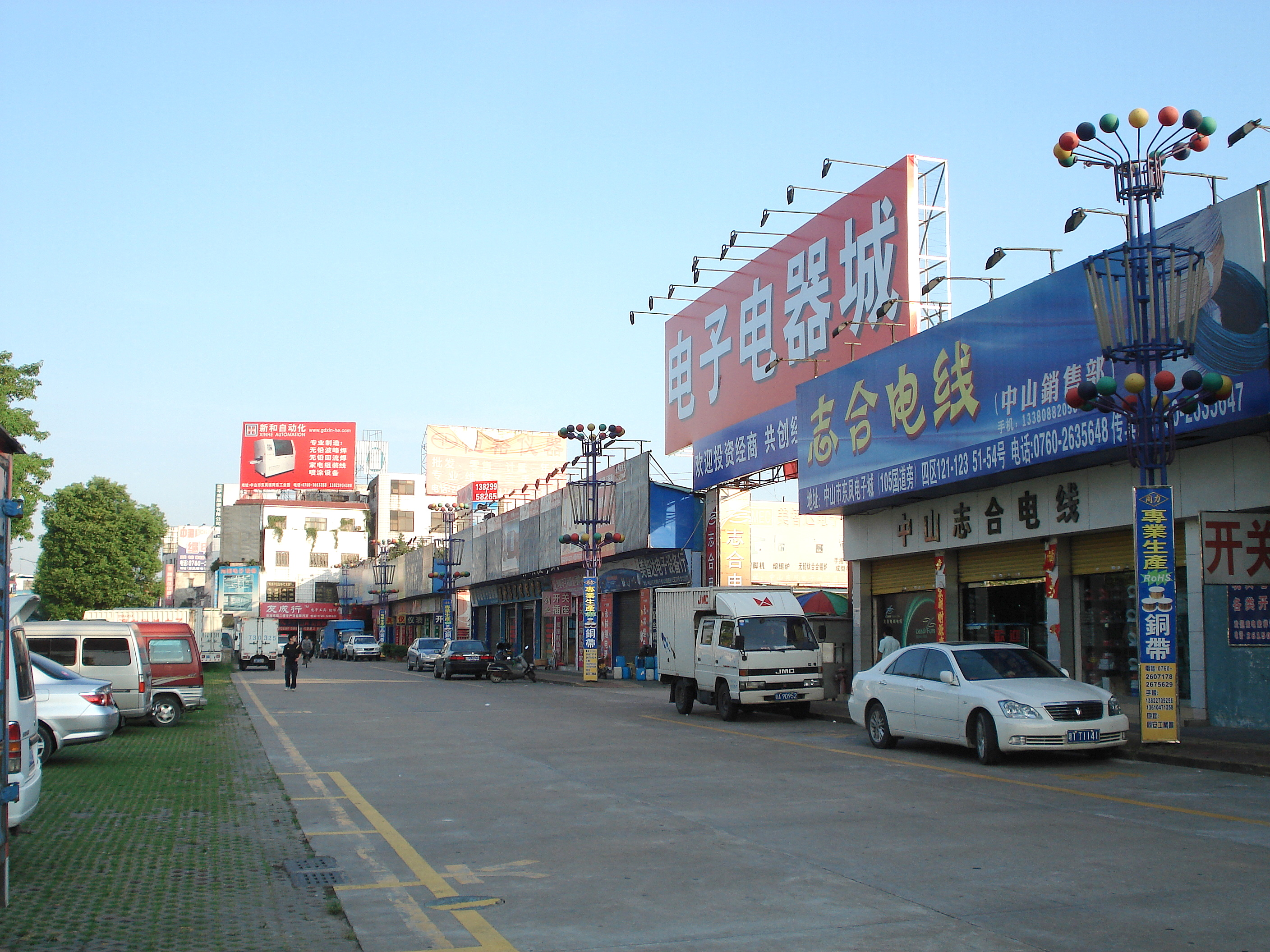 中文（香港）: 位處中山市東鳳鎮之電子電器城